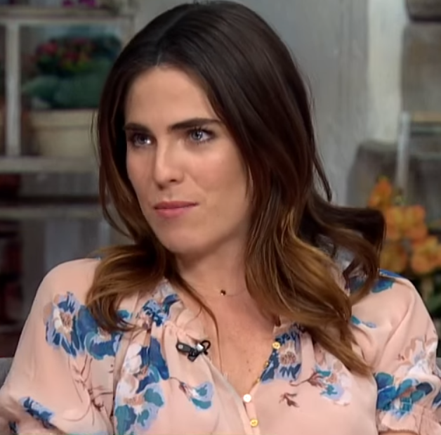 Karla Souza entrevista